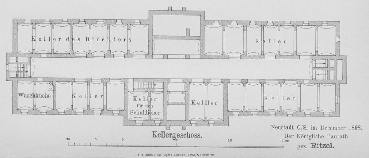 Rzut piwnic